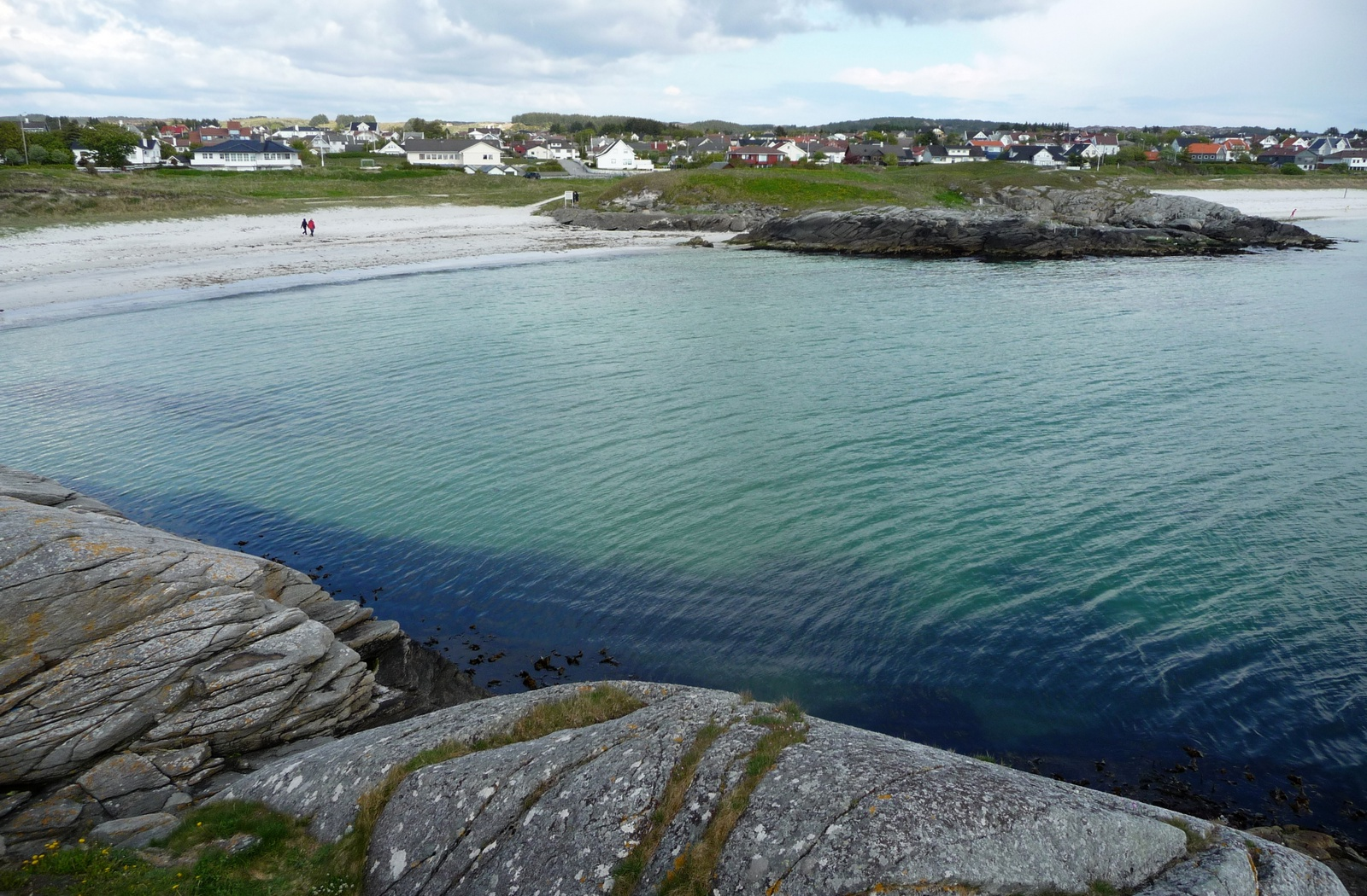 Åkrasanden 05.2010